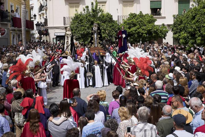 Celebración de "El Paso" Semana Santa Almuñécar